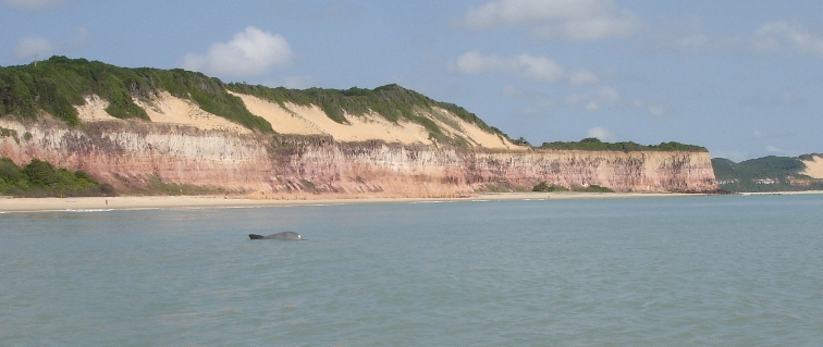 Baía dos Golfinhos, Rio Grande do Norte, Brasil.